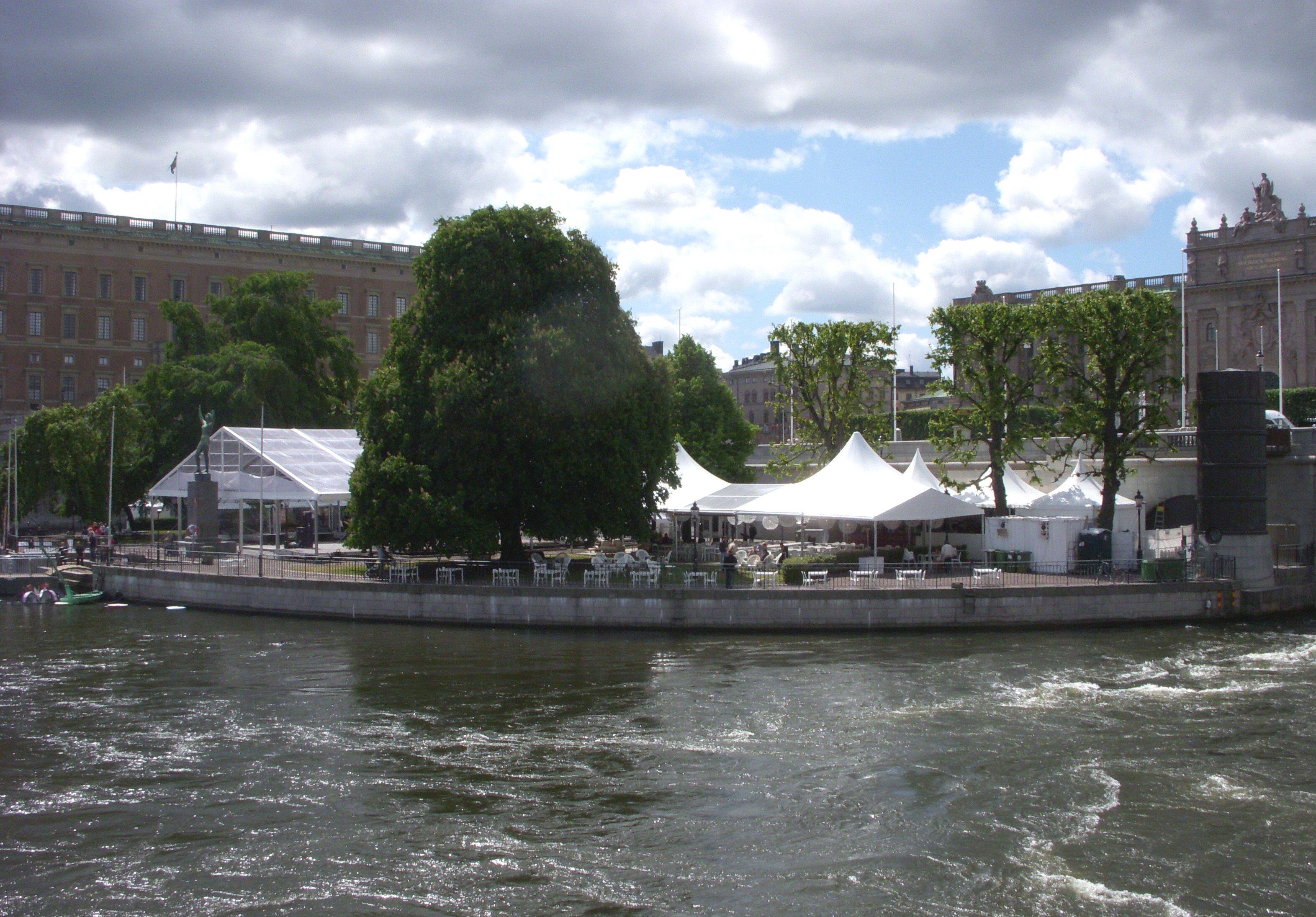 Strömparterren den 15 juni 2010 med festtält